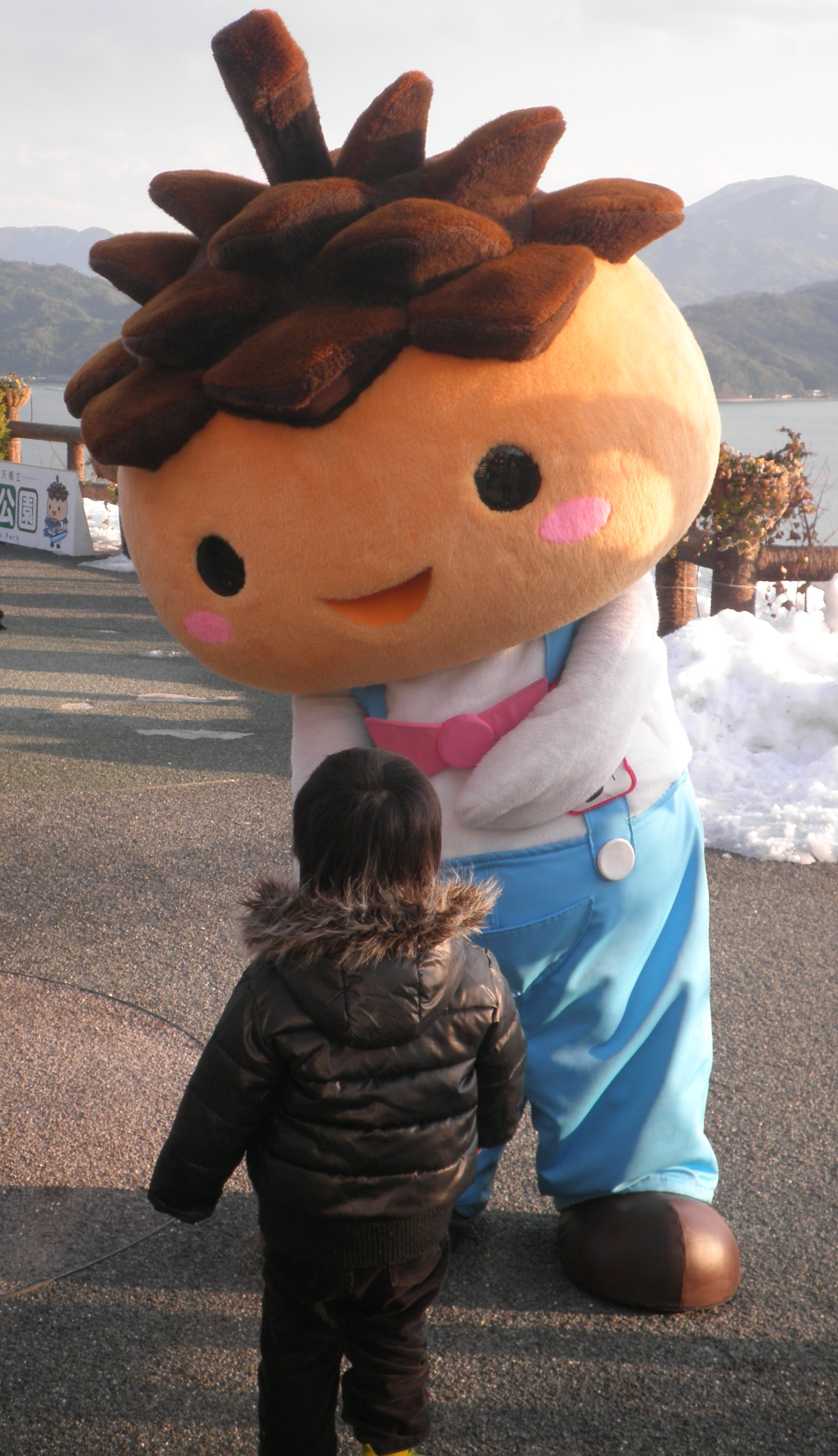 京都府宮津市の傘松公園のマスコットキャラクターである「かさぼう」